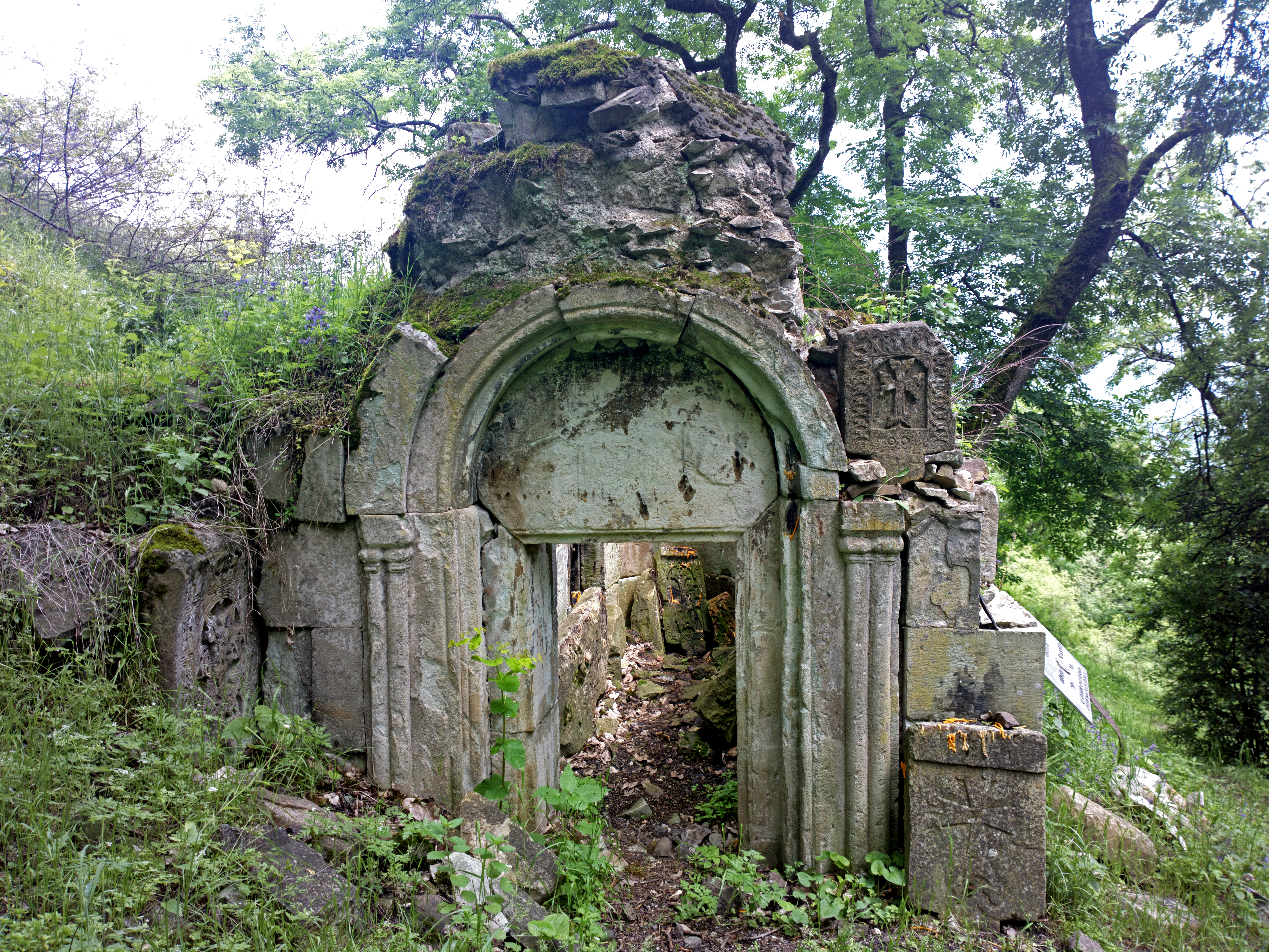 Վանական Համալիր Նոր Վարագավանք (Անապատ) 60/10